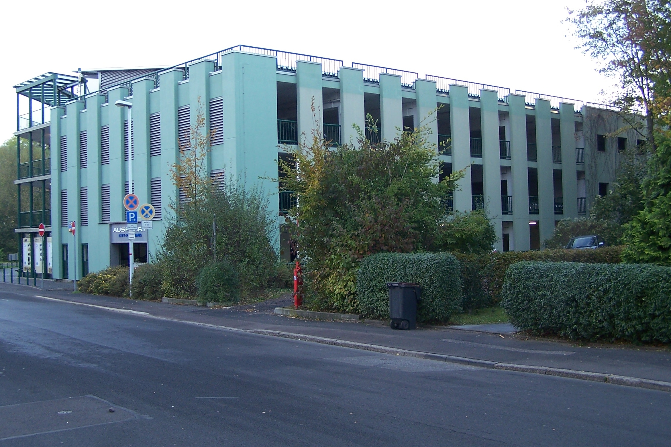 Die Südfassade der ehemaligen Wagenhalle.